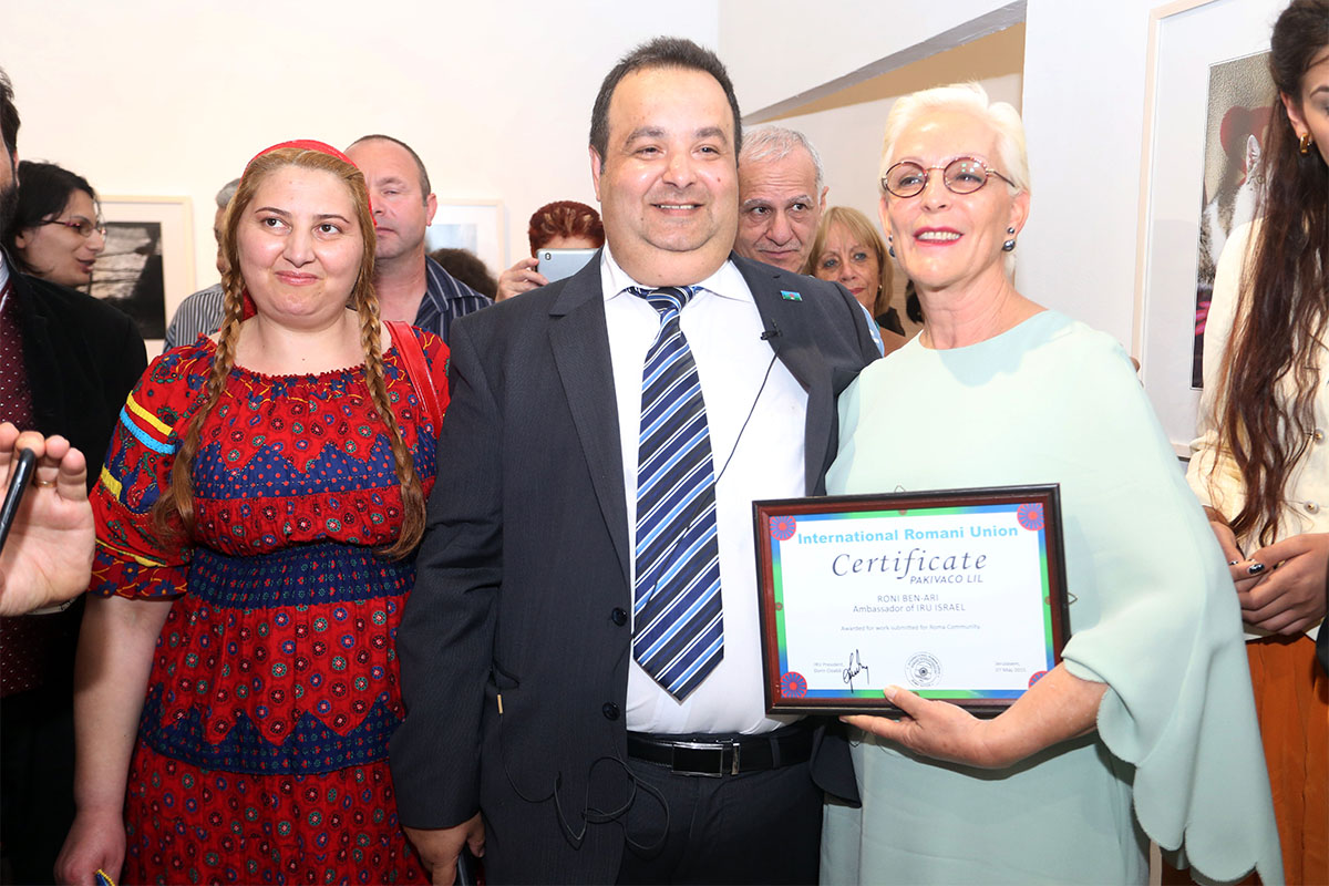 רוני בן ארי מקבלת תואר שגרירה של כבוד של הצוענים ממלך הצוענים דורין צובה